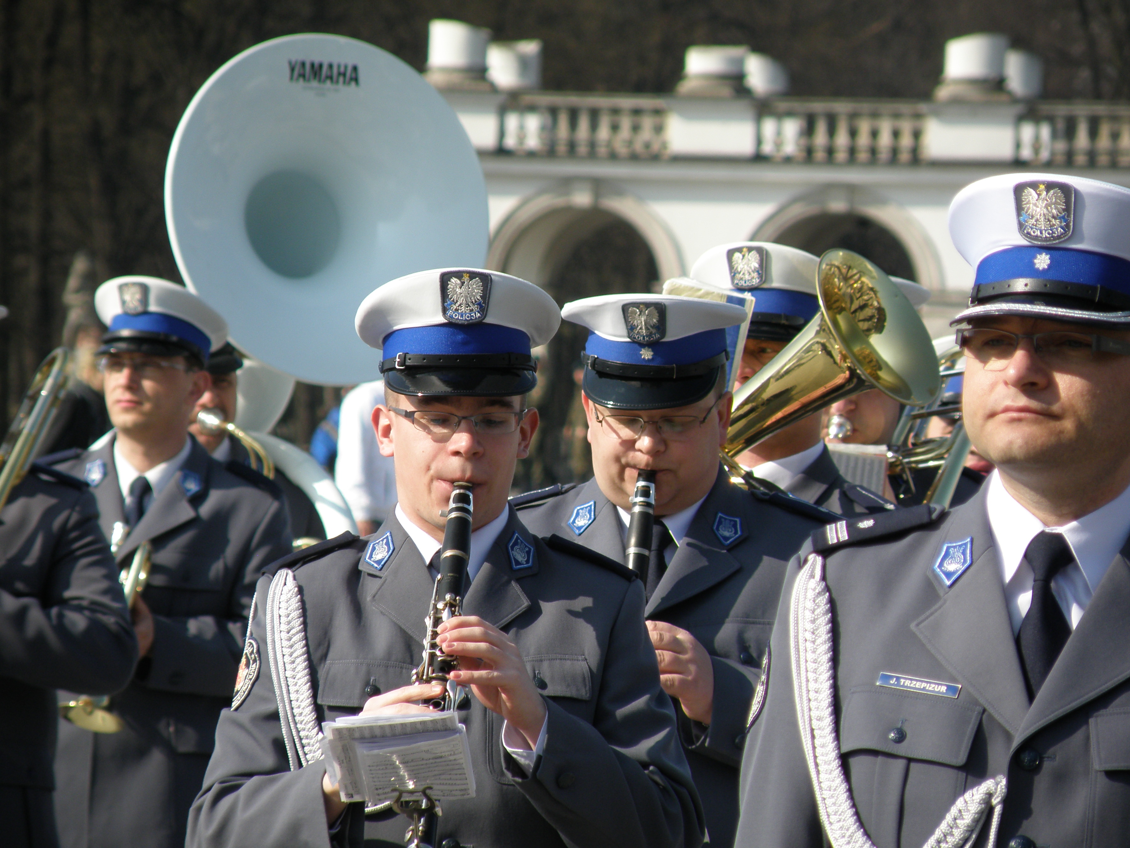 Warszawa - Orkiestra Reprezentacyjna Policji KSP